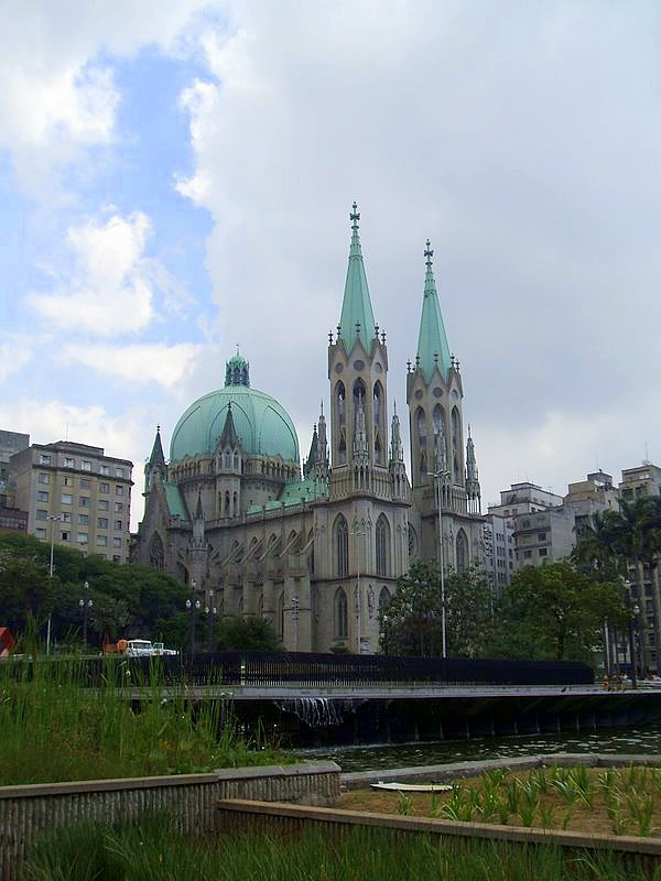 Catedral da Sé, vista da praça homônima, no centro de São Paulo, Brasil.